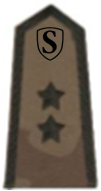 Starszy Chorąży ZS